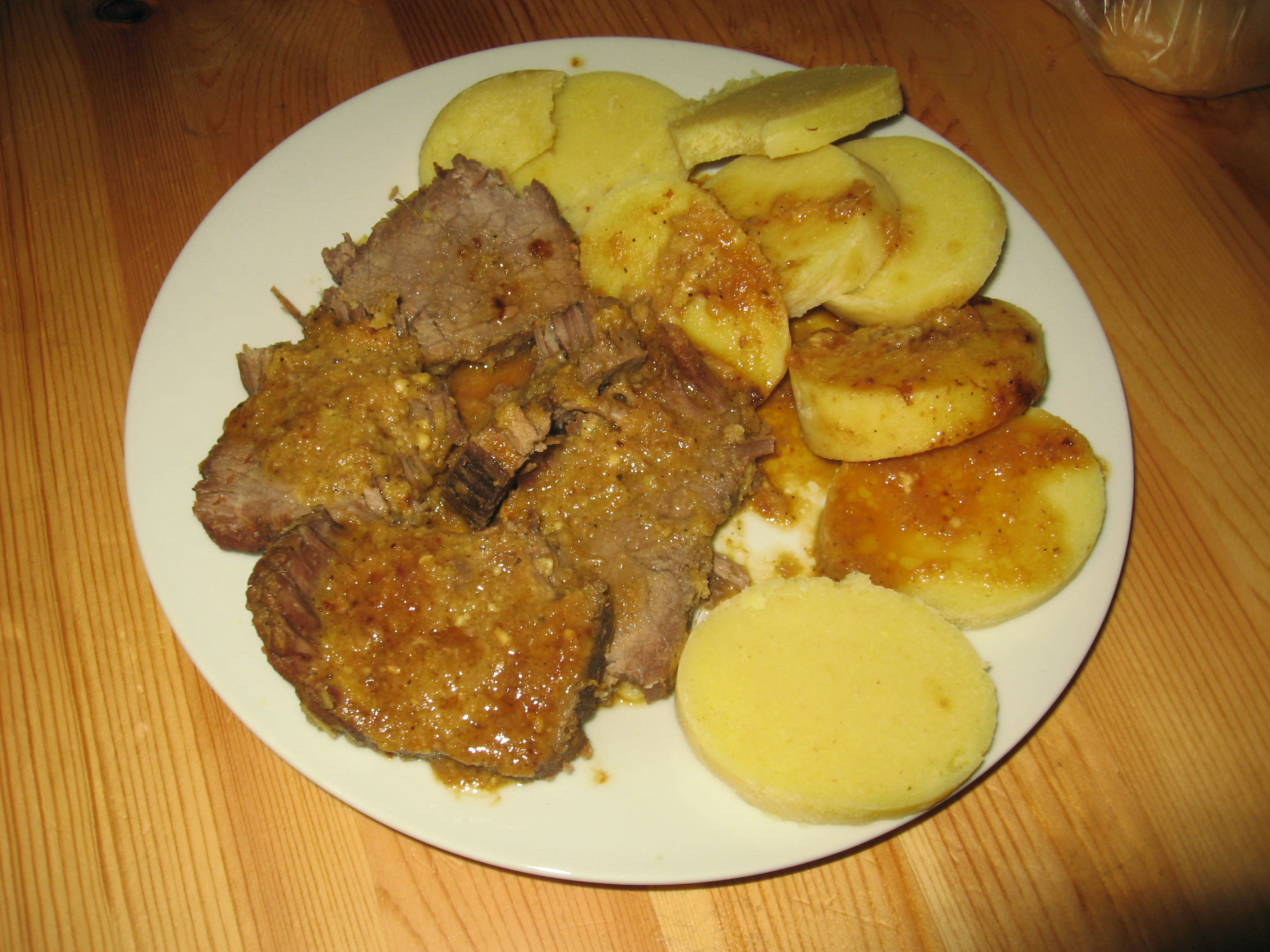 pečené hovězí na zázvoru, bramborový knedlík